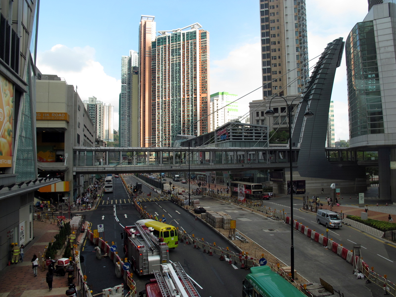 Yeung Uk Road 楊屋道 (2011-05)